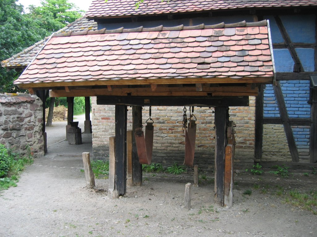 Ecomusée d'Alsace